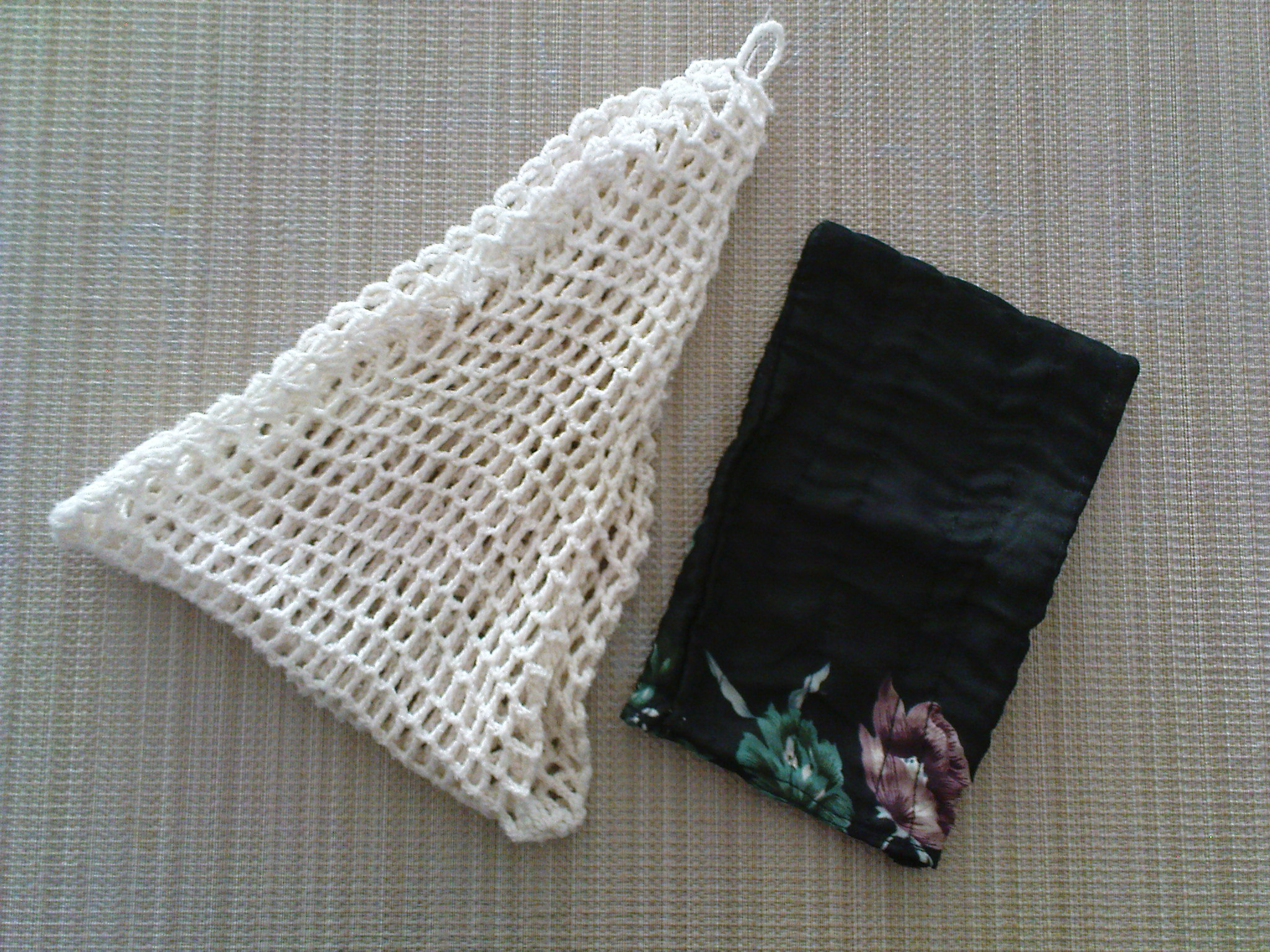 Kurdî: کیسە و لیفکە